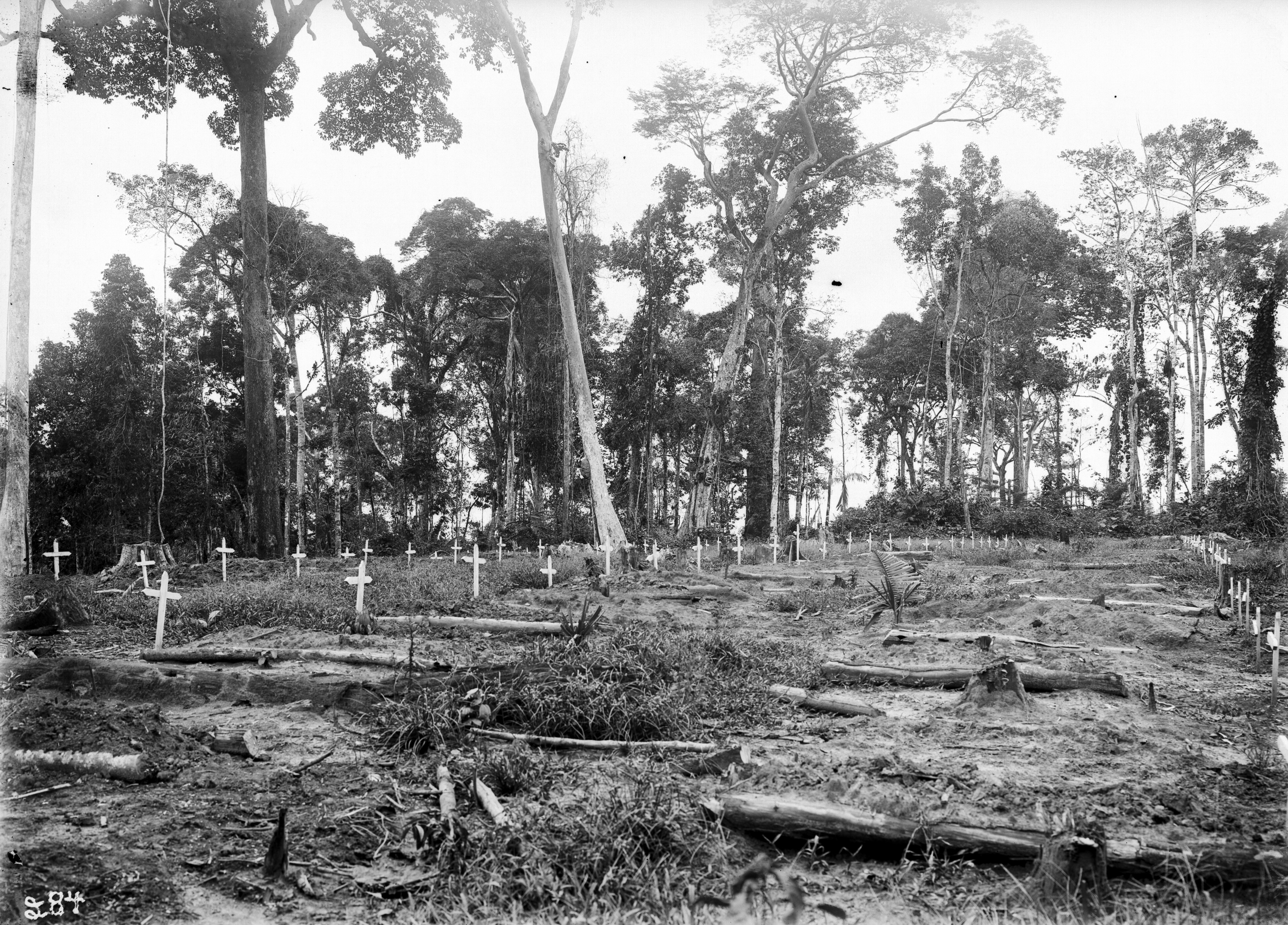 Obra que integra o acervo do Museu Paulista da USP. Coleção Dana Merrill.